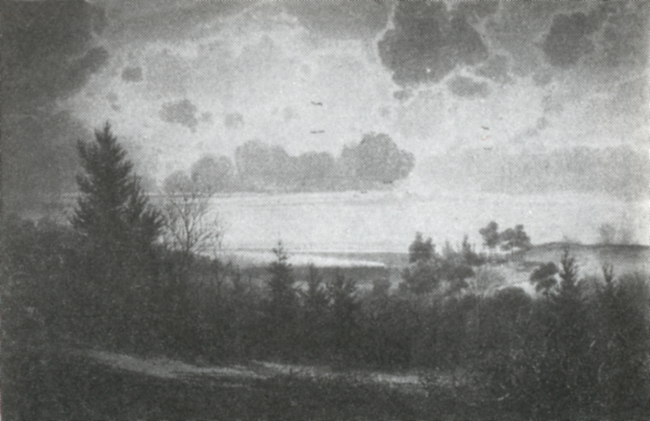 Klein-Glienicke, Blick von der Weißen Bank im Park